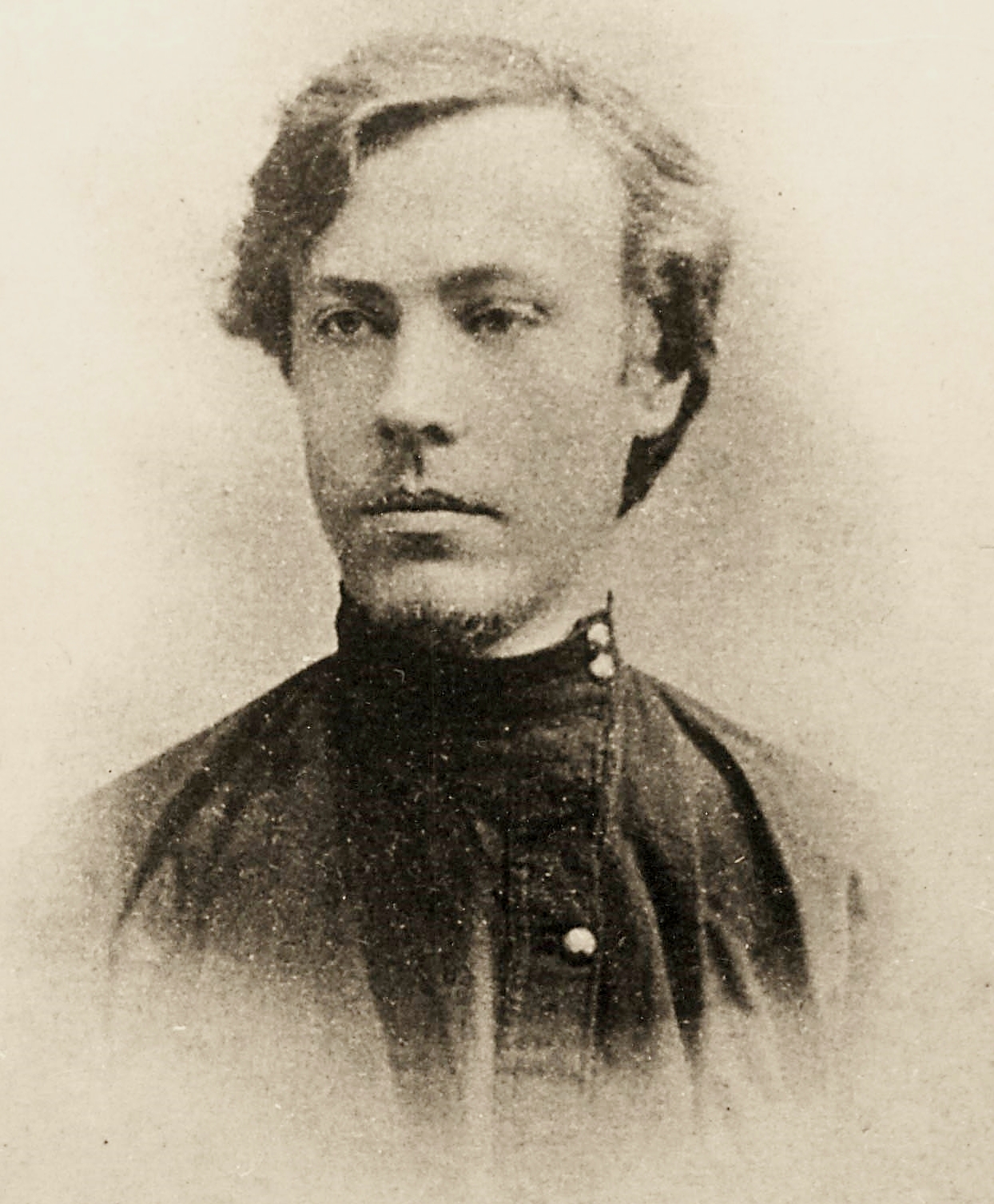 Stepan Valerianovič Balmašëv (1881-1902)